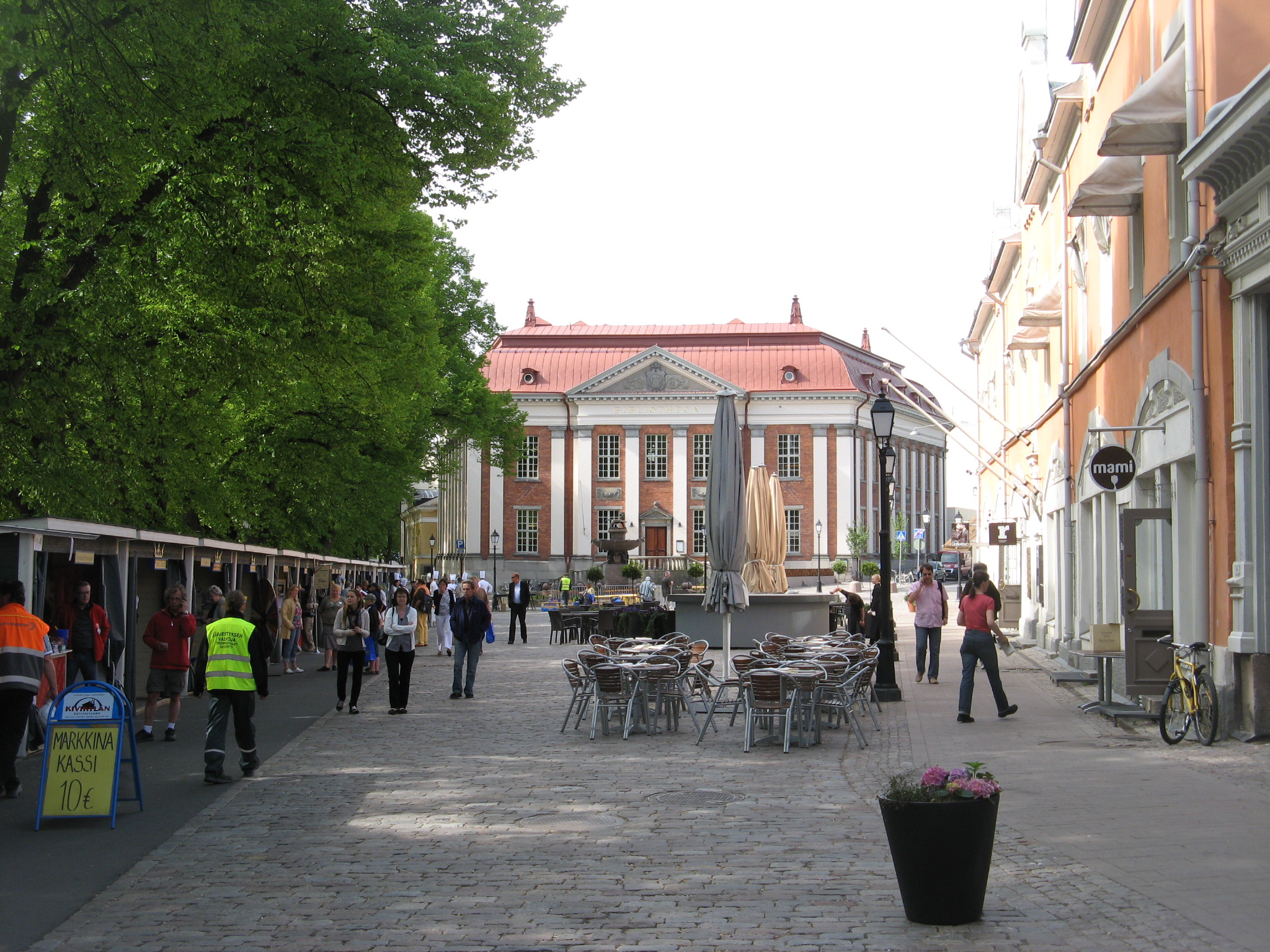 Lilltorget i Åbo, här med marknadsstånd (Satakunda presenterar sig?).